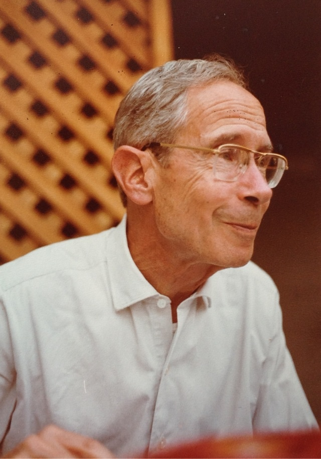 Photo de Pierre Segond pris en 1982 à Fribourg lors d'une visite d'orgue de la classe d'orgue du Conservatoire de Genève.